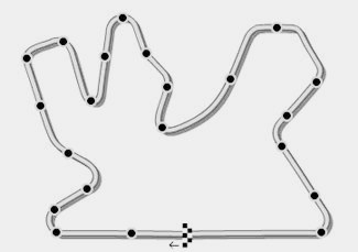 plattegrond circuit Losail